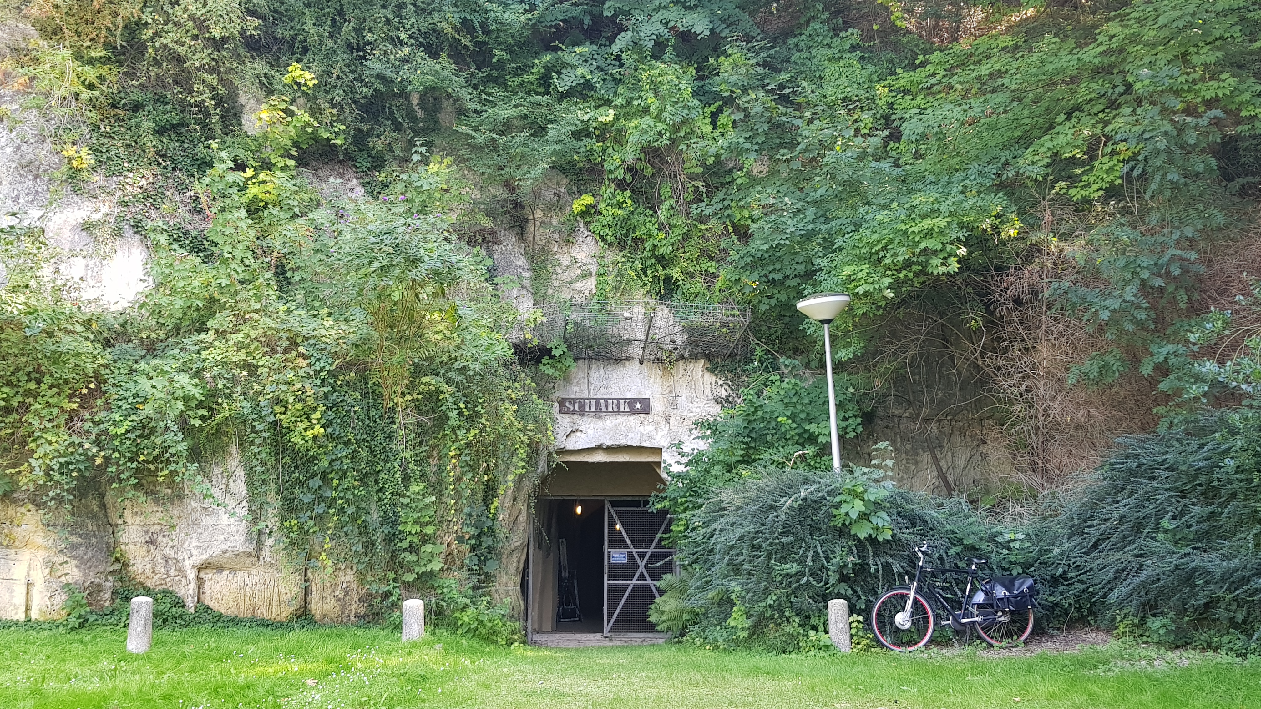 Groeve de Schark, Maastricht, Nederland